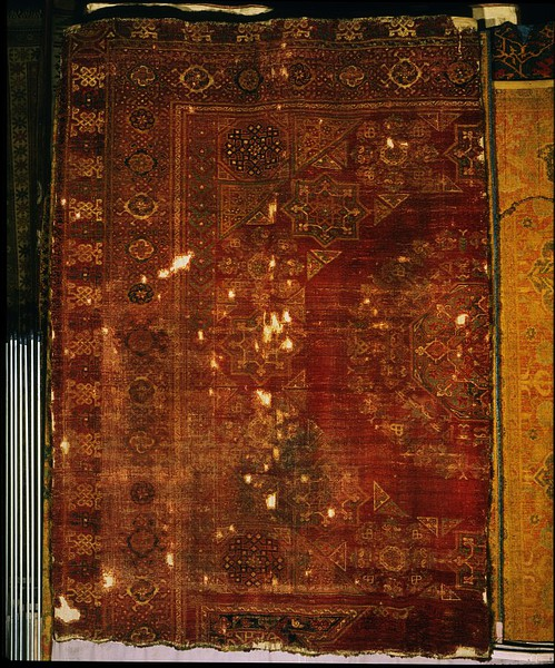 Mamluk art